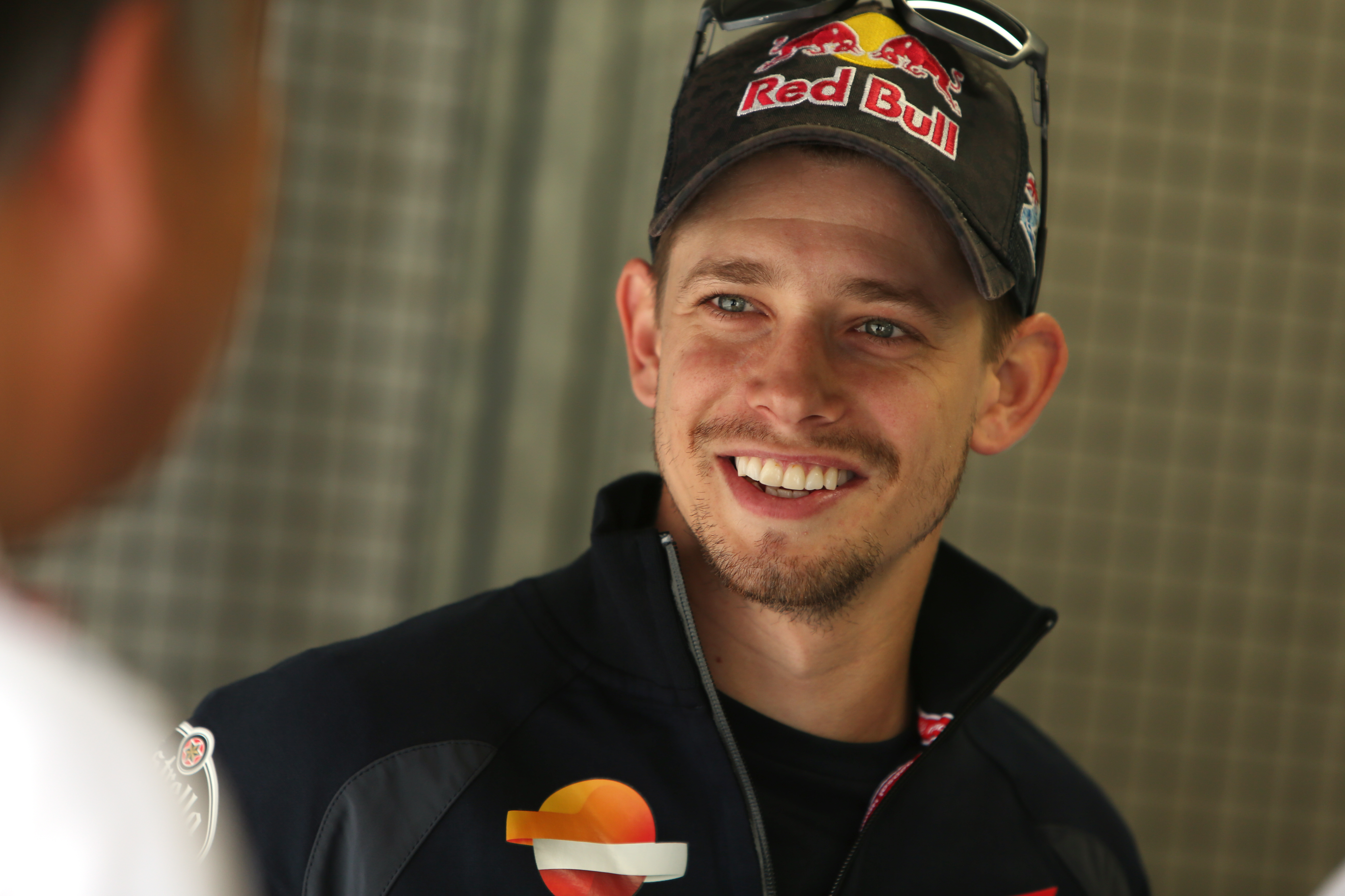 Photo 2013 de face de Casey Stoner, pilote MotoGP Honda